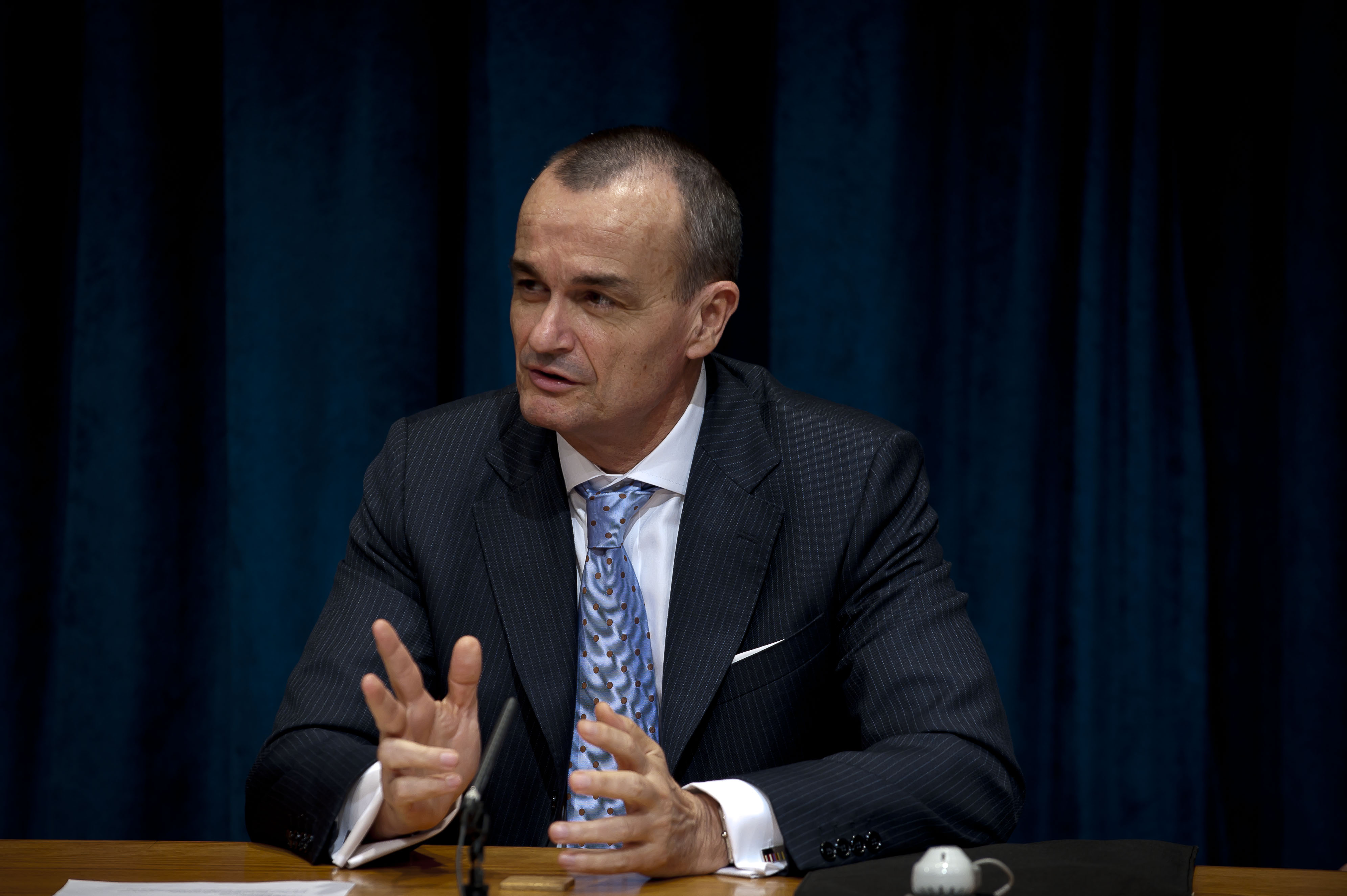 A l'occasion de la présidence française du Conseil de sécurité du mois de mai 2011, Gérard Araud rencontre les médias lors de la traditionnelle conférence de presse de présentation du programme de travail du Conseil (3 mai 2011)